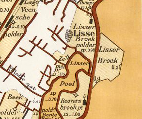 Lisserbroekpolder